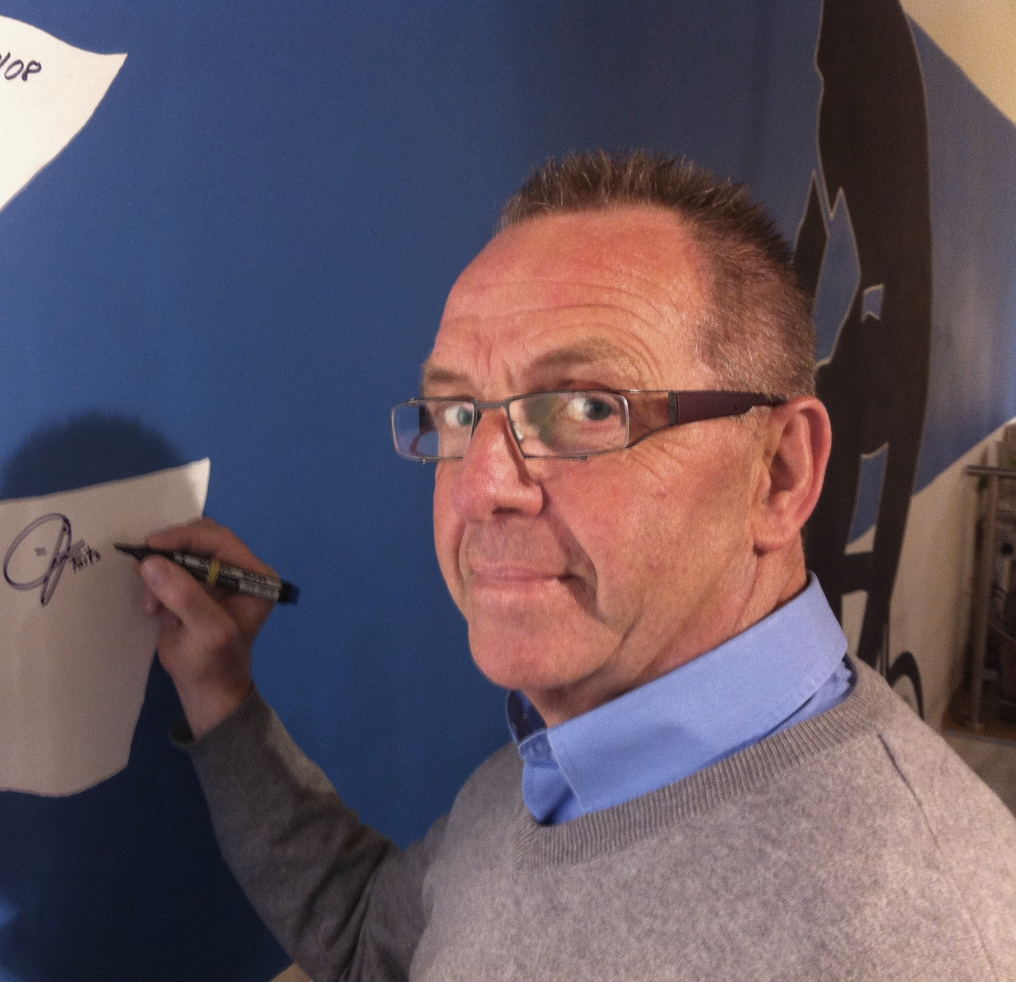 Frits Schür zet zijn handtekening op de Vredesduif als delnemer van de zg Friedensfahrt in het museum in Kleinmuhlingen ( voorheen DDR )